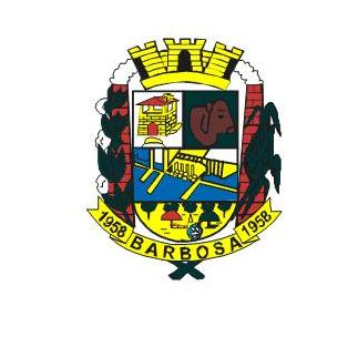 Brasão da cidade de barbosa